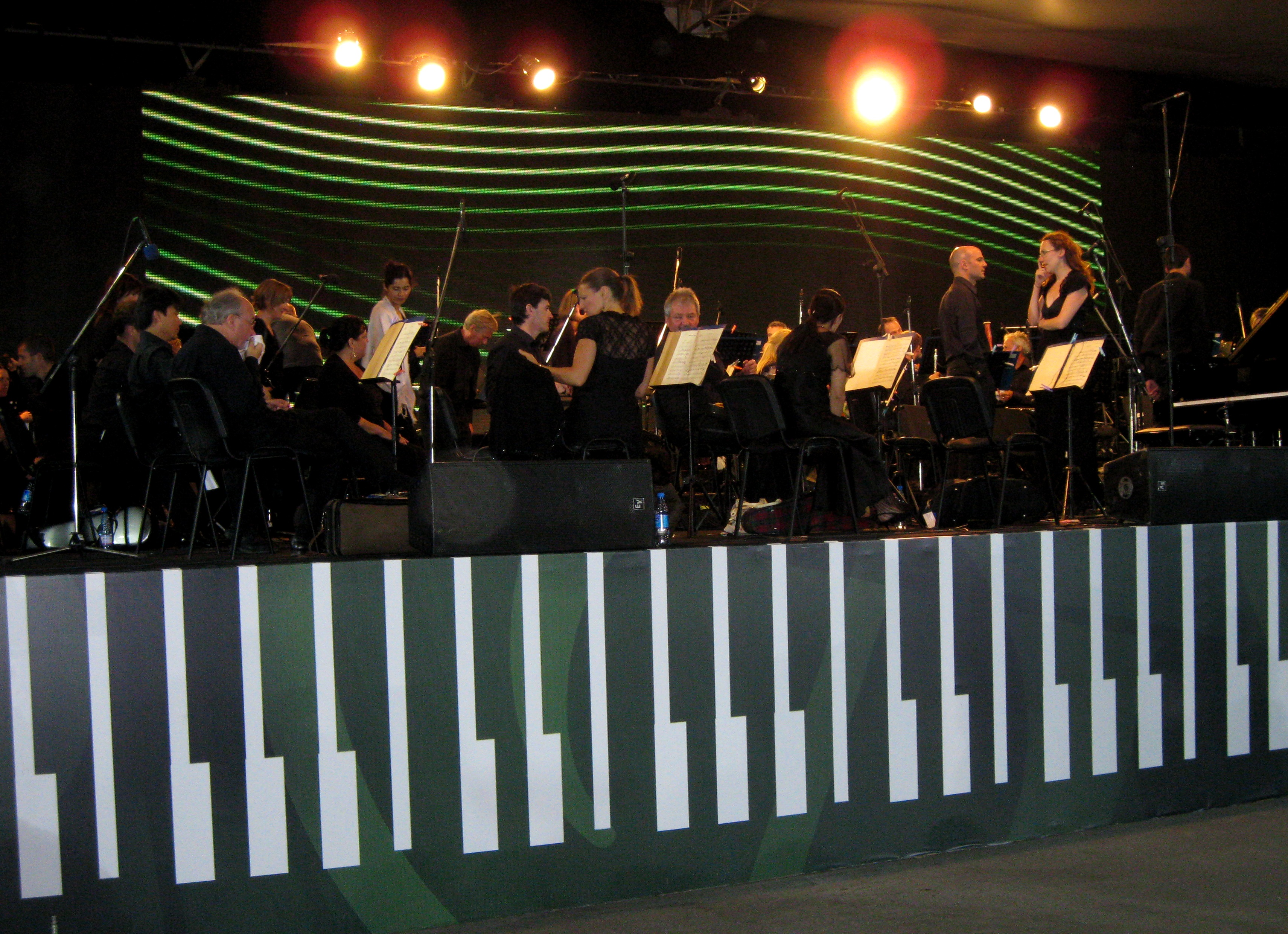 Габалинский музыкальный фестиваль. Азербайджан.